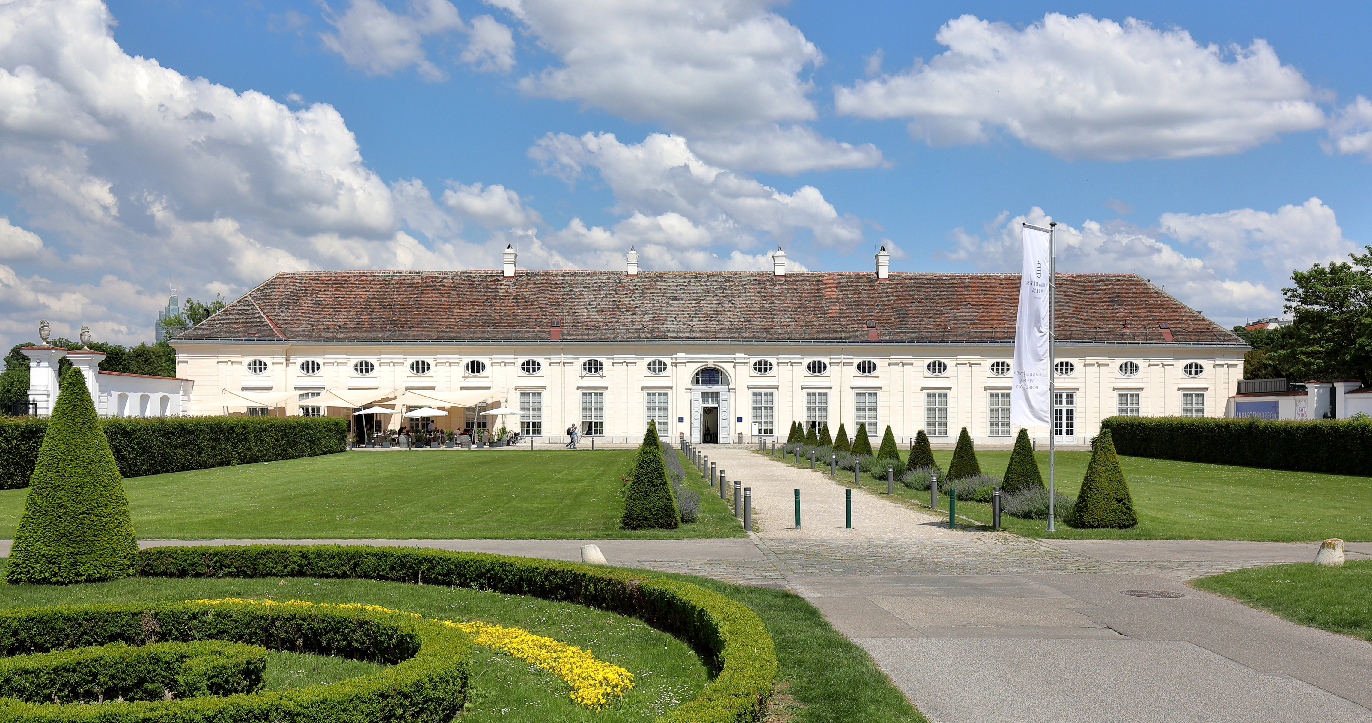 Das Schloss Augarten bzw. die Porzellanmanufaktur Augarten im 2. Wiener Gemeindebezirk Leopoldstadt. Das ursprüngliche Schloss wurde im Zuge der 2. Wiener Türkenbelagerung 1683 zerstört. Kaiser Joseph I. ließ 1705 auf den Resten des nordöstlichen Seitenflügels einen länglichen Saalbau errichten. Seit 1923 ist die Wiener Porzellanmanufaktur darin untergebracht, die darin aktuell (2018) ein Museum betreibt.